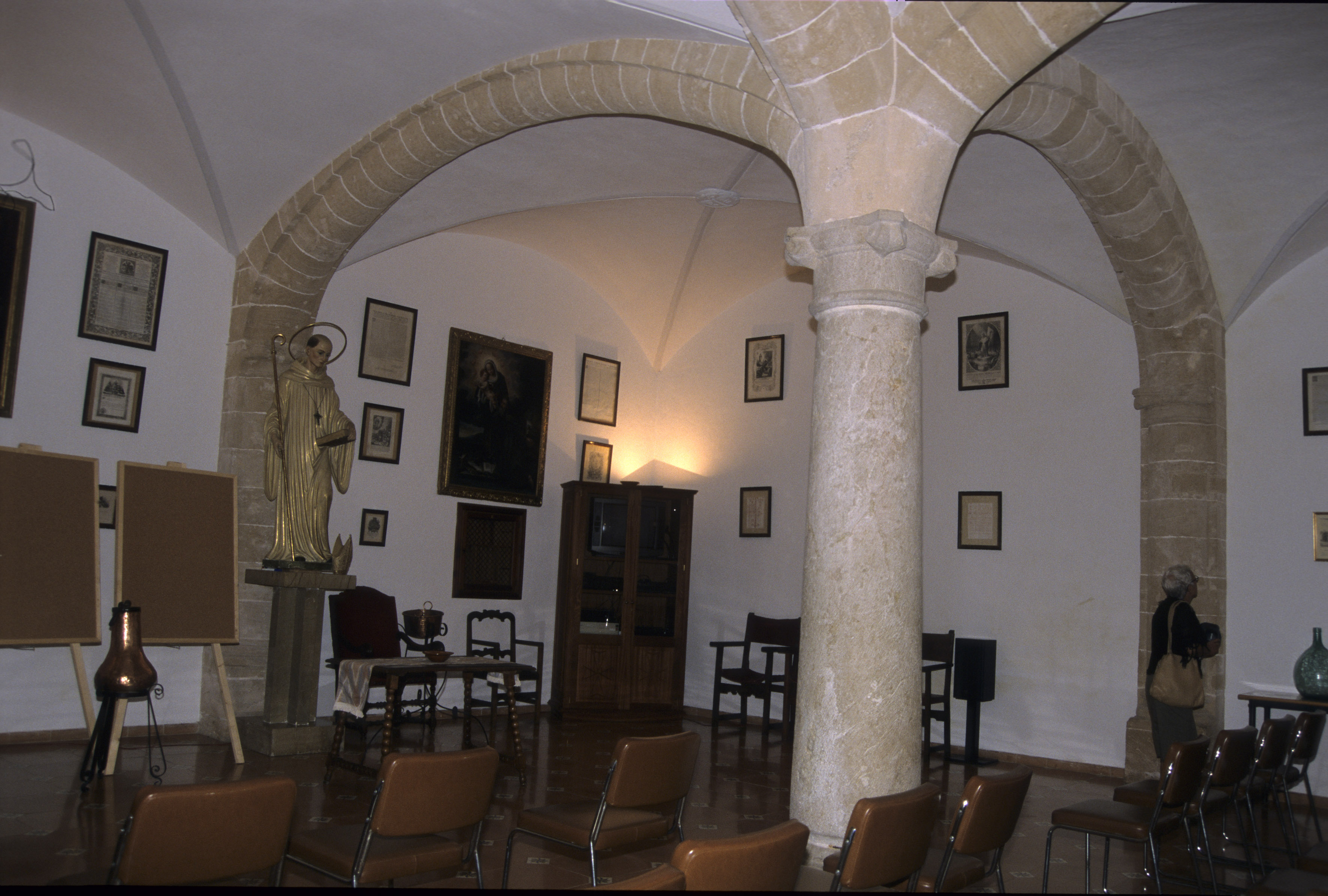 Monestir de Santa Maria de la Real. L'aula capitular actualment, presidida per una bella imatge de Sant Bernat. Any 2003.